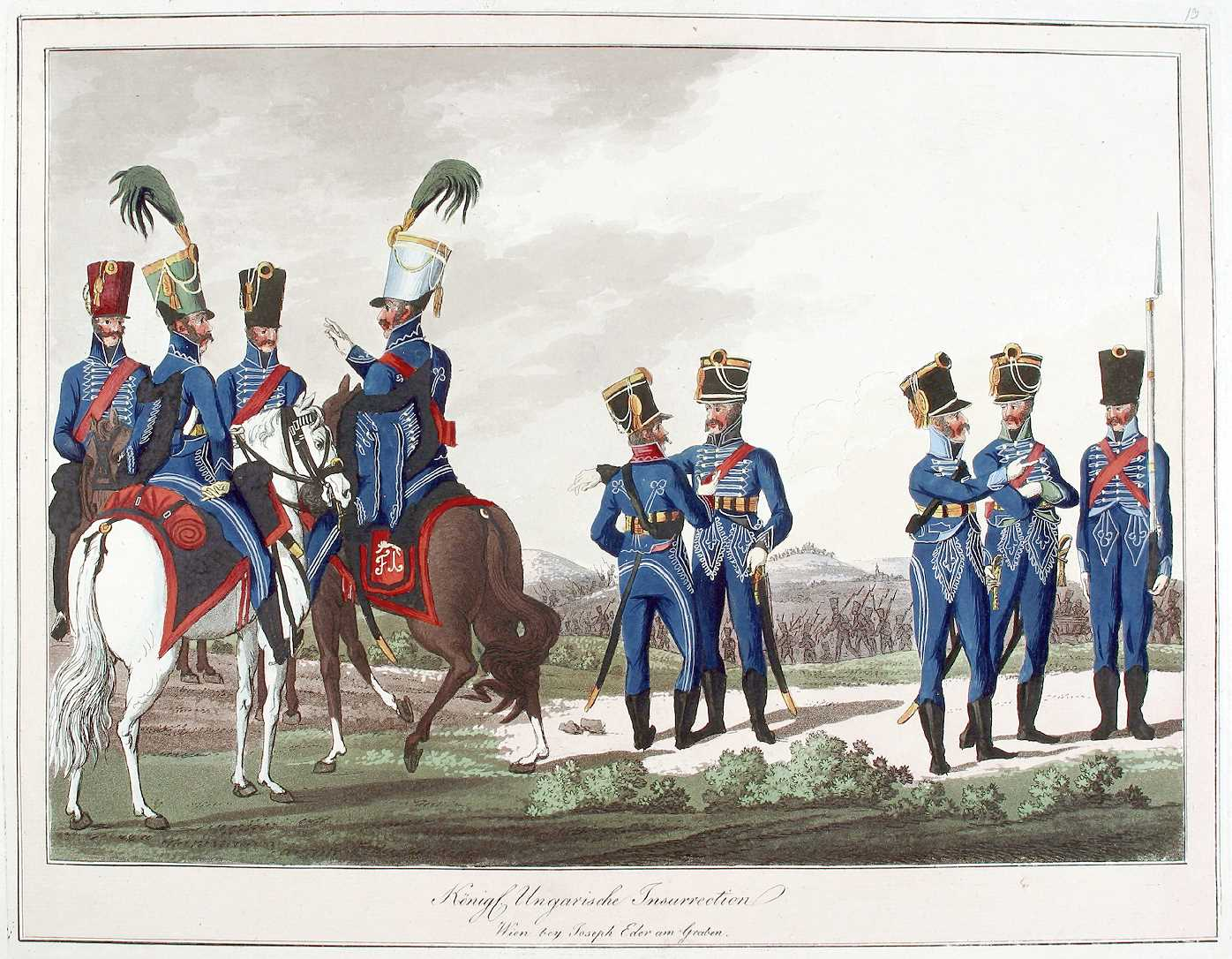 Ungarische Insurrektion